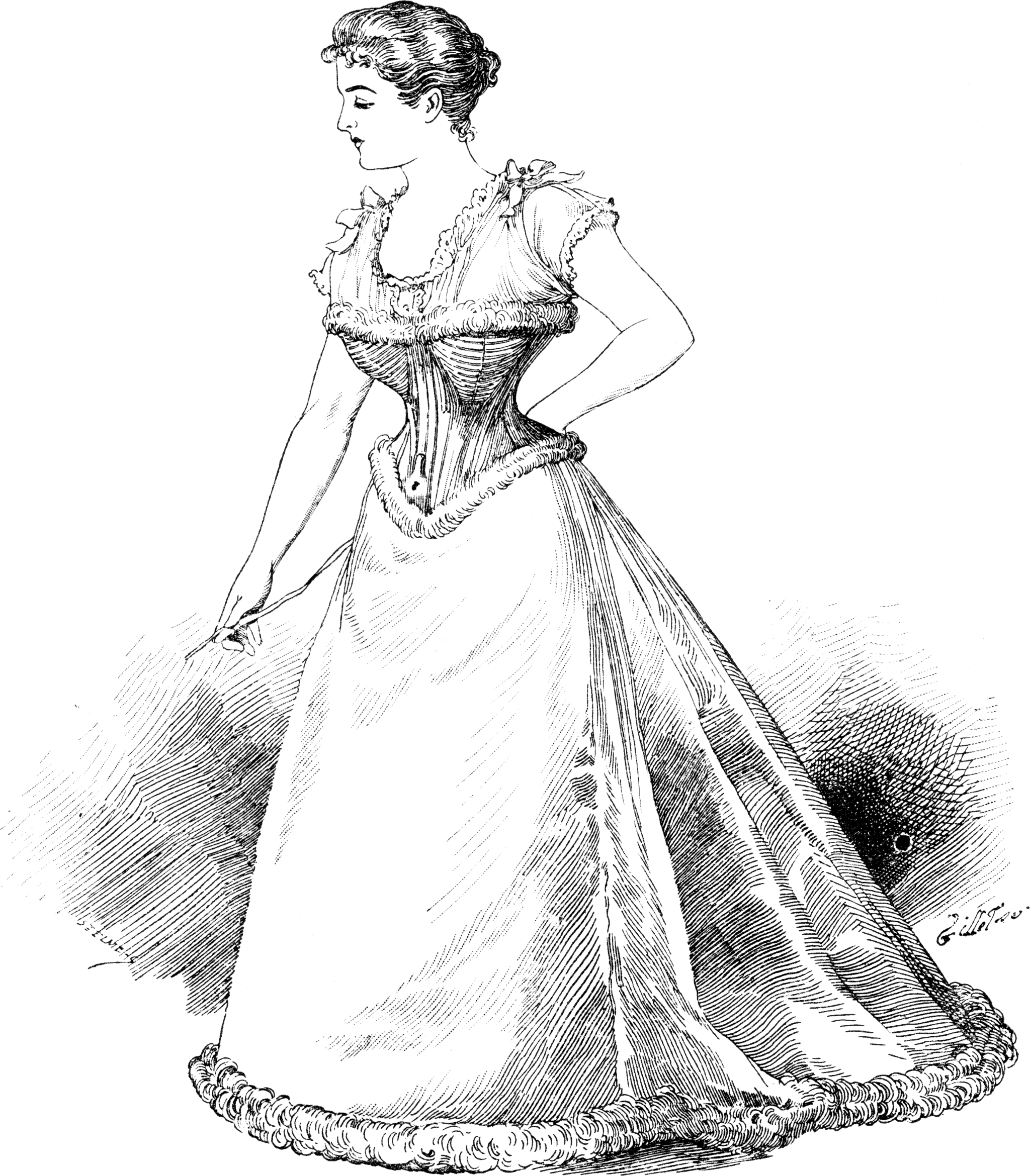 Fig. Pl. XII — Corset Léoty (1867).